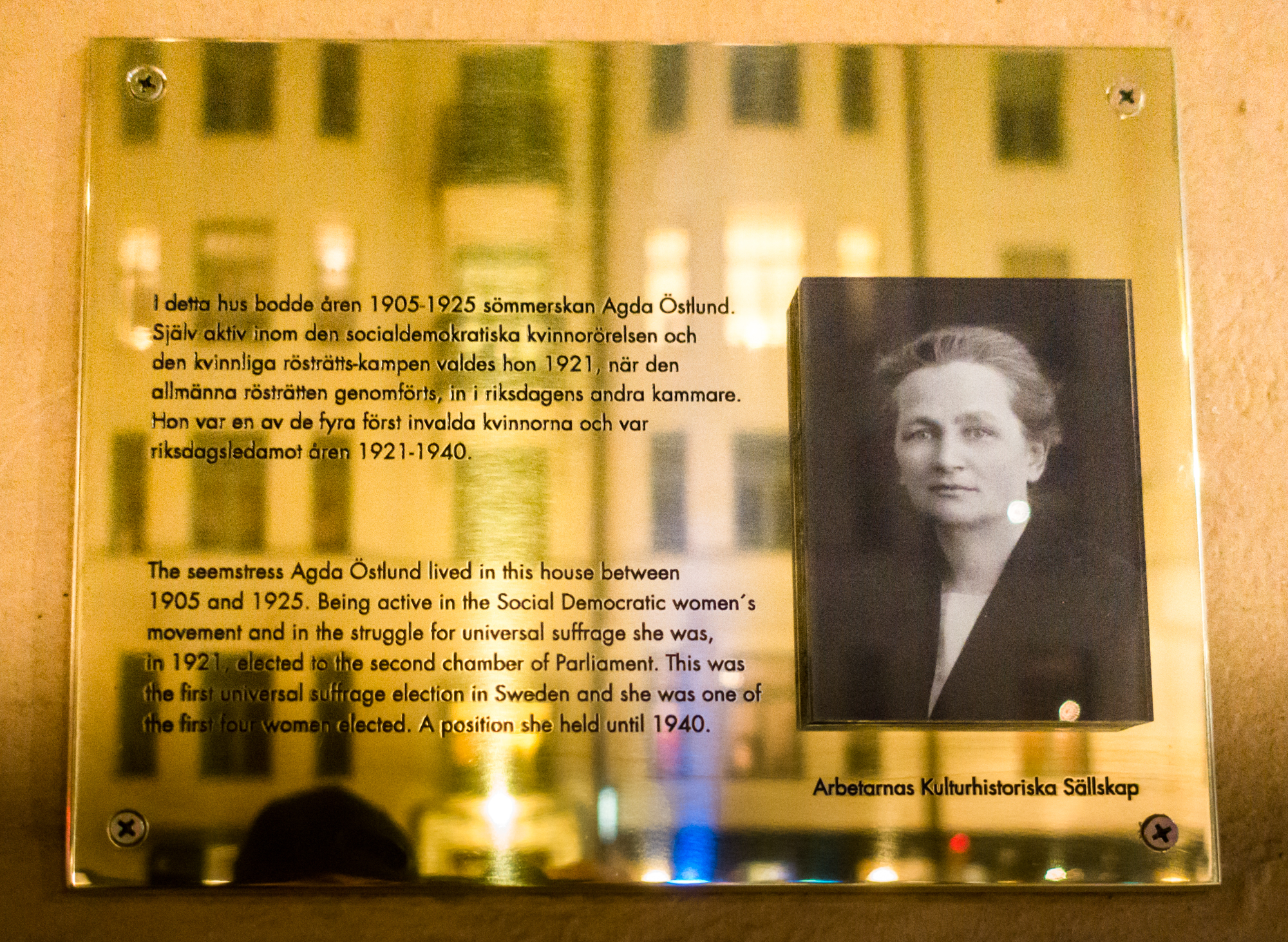 Bo Ringholm den 27 november 2019 vid invigningen av minnesmärket över Agda Östlund på Upplandsgatan 61 i Stockholm.